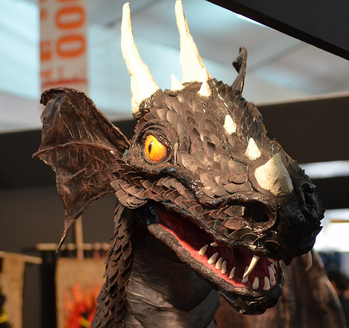 Lucca Comics 2012